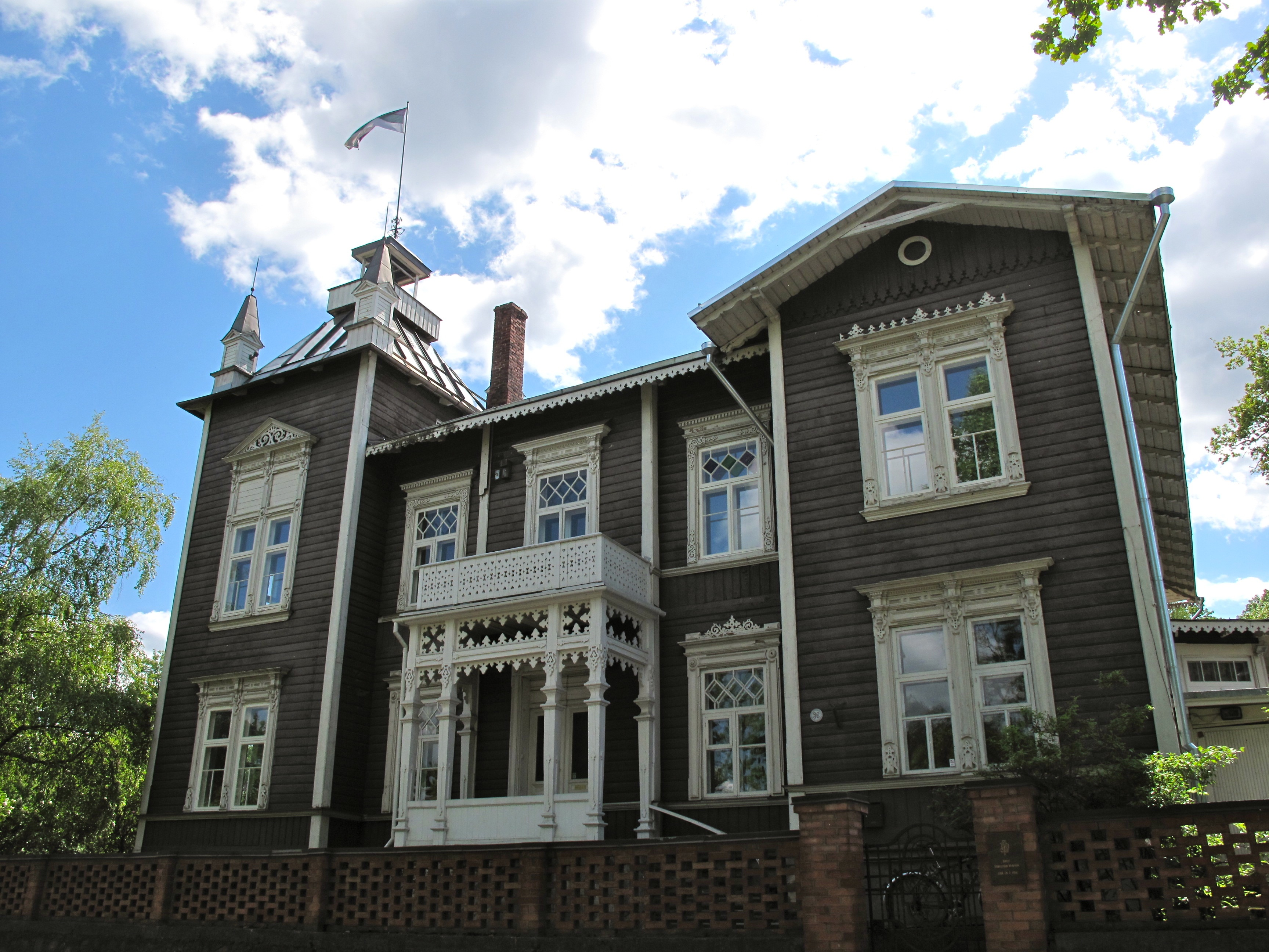 Puitelamu Tartus aadressil Jakobi 52